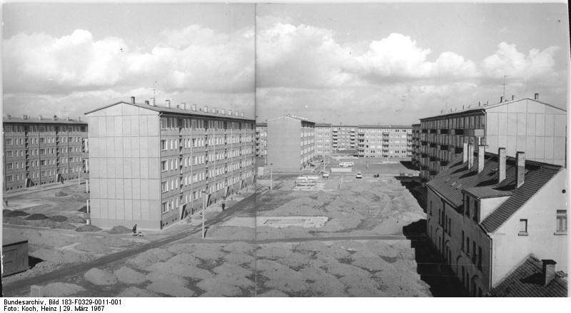 Leipzig, Großzschocher, Wohnblöcke Zentralbild Koch 29.3.1967 Leipzig: Neubauviertel Leipzig-Großzschocher Nach dem Entwurf des Perspektivplanes für den Bezirk Leipzig sollen im Zeitraumvon 1966 bis 1970 10900 Wohnungen allein in der Messemetropole gebaut werden. (Panorama)